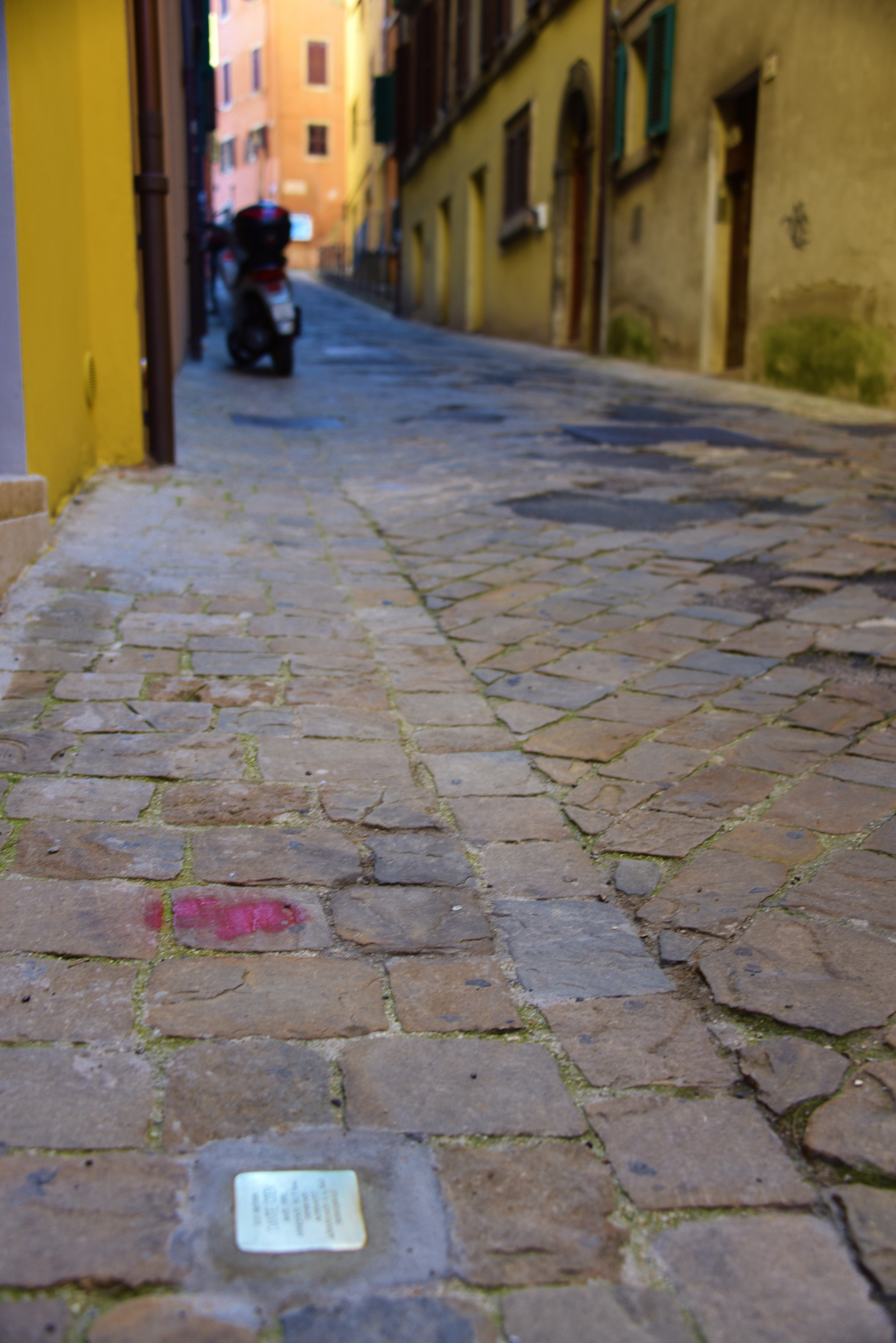 Stolperstein in Ancona